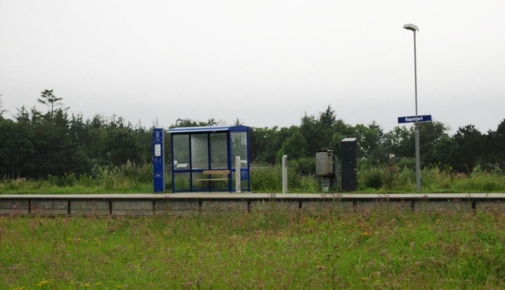 Napstjært stasjon på Skagenbanen i Danmark.